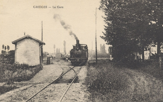 Gare de Grièges pour les tramways de l'Ain.